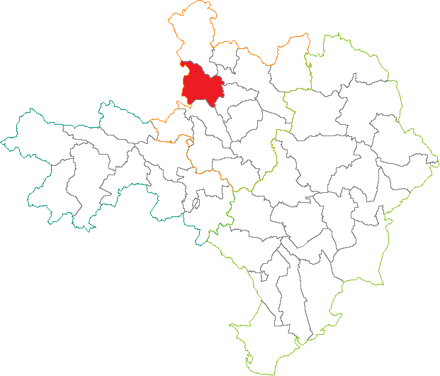 Situation du canton dans le département du Gard (France)